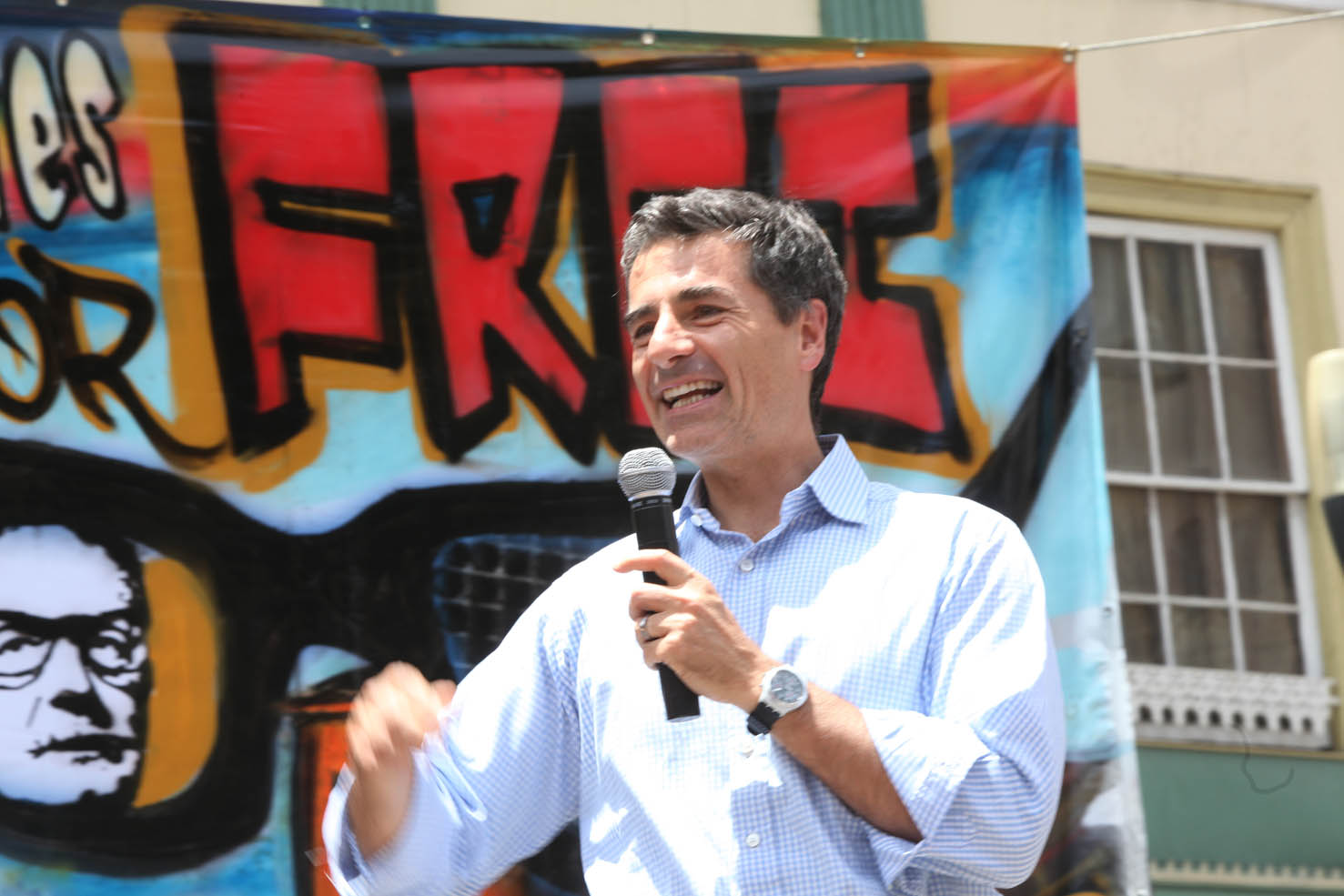 Andrés Velasco (n. Santiago, 30 de agosto de 1960) es un economista chileno, actual ministro de Hacienda.